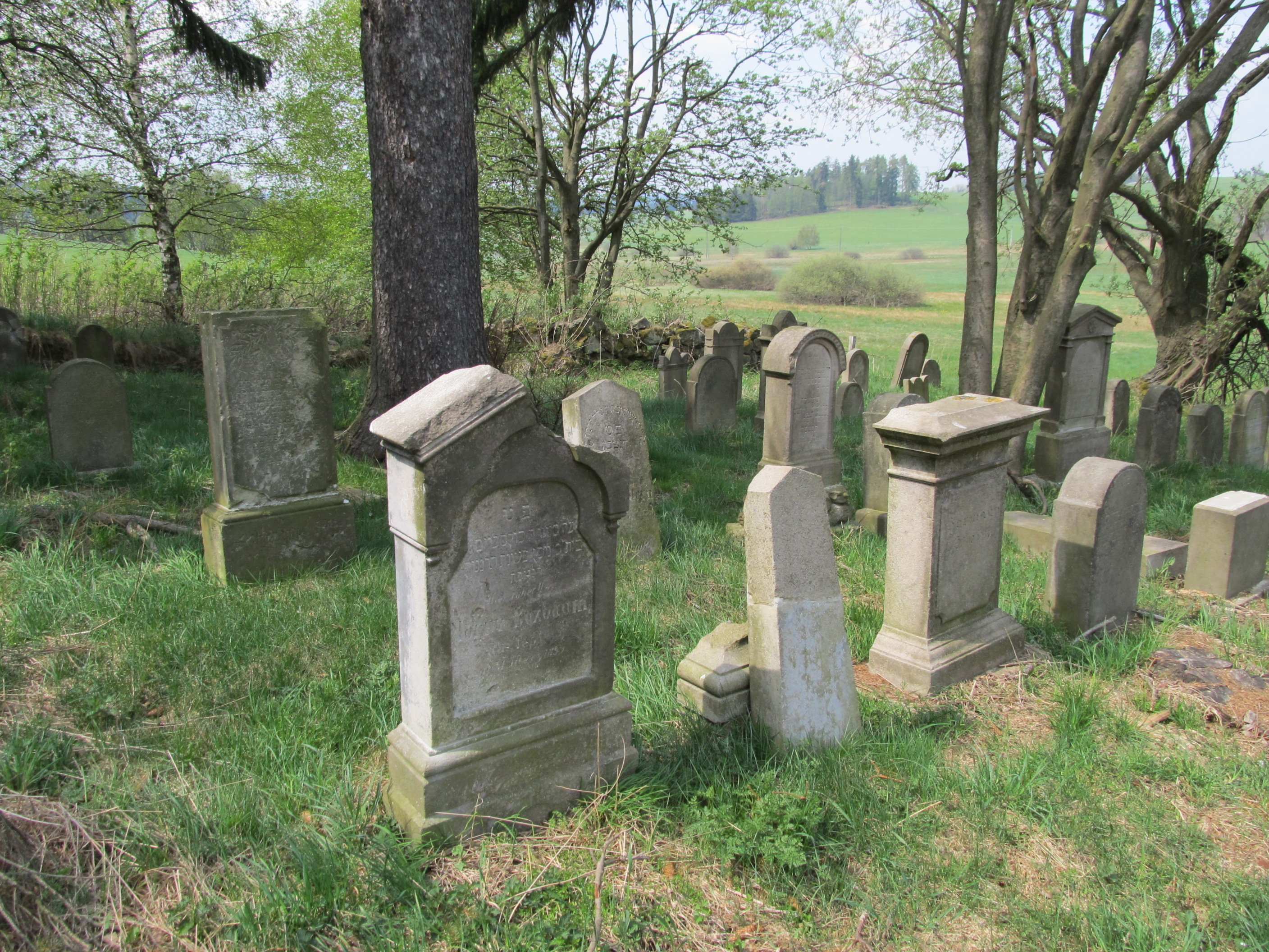 Poutnov židovský hřbitov